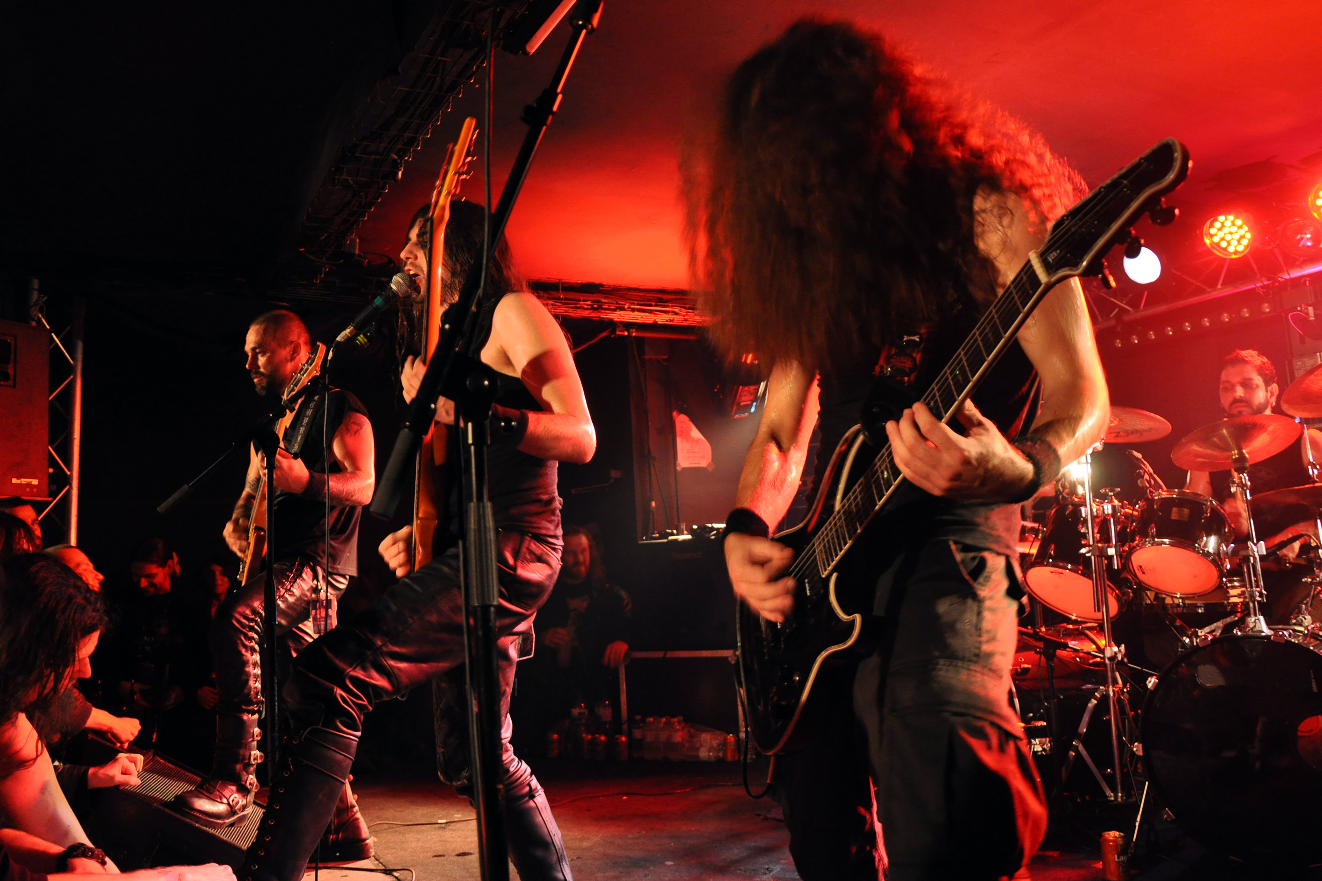 Absu en concert au Glazart, à Paris, le 31 Octobre 2009.